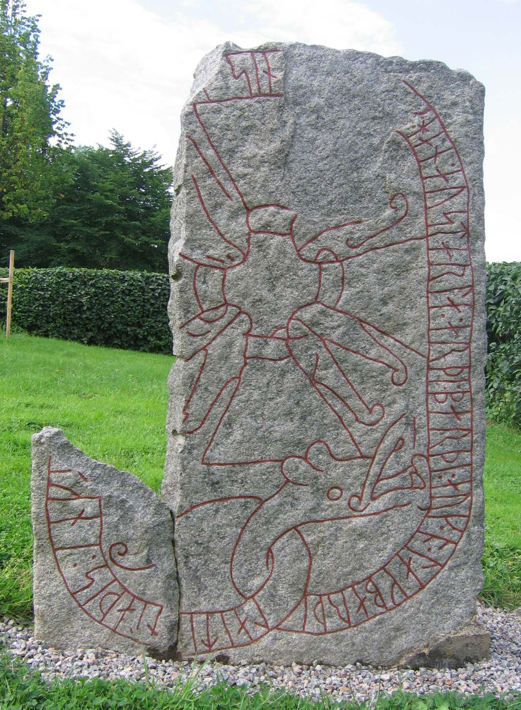 Runstenen Sö 65 i Djulefors, Stora Malm, Katrineholm.